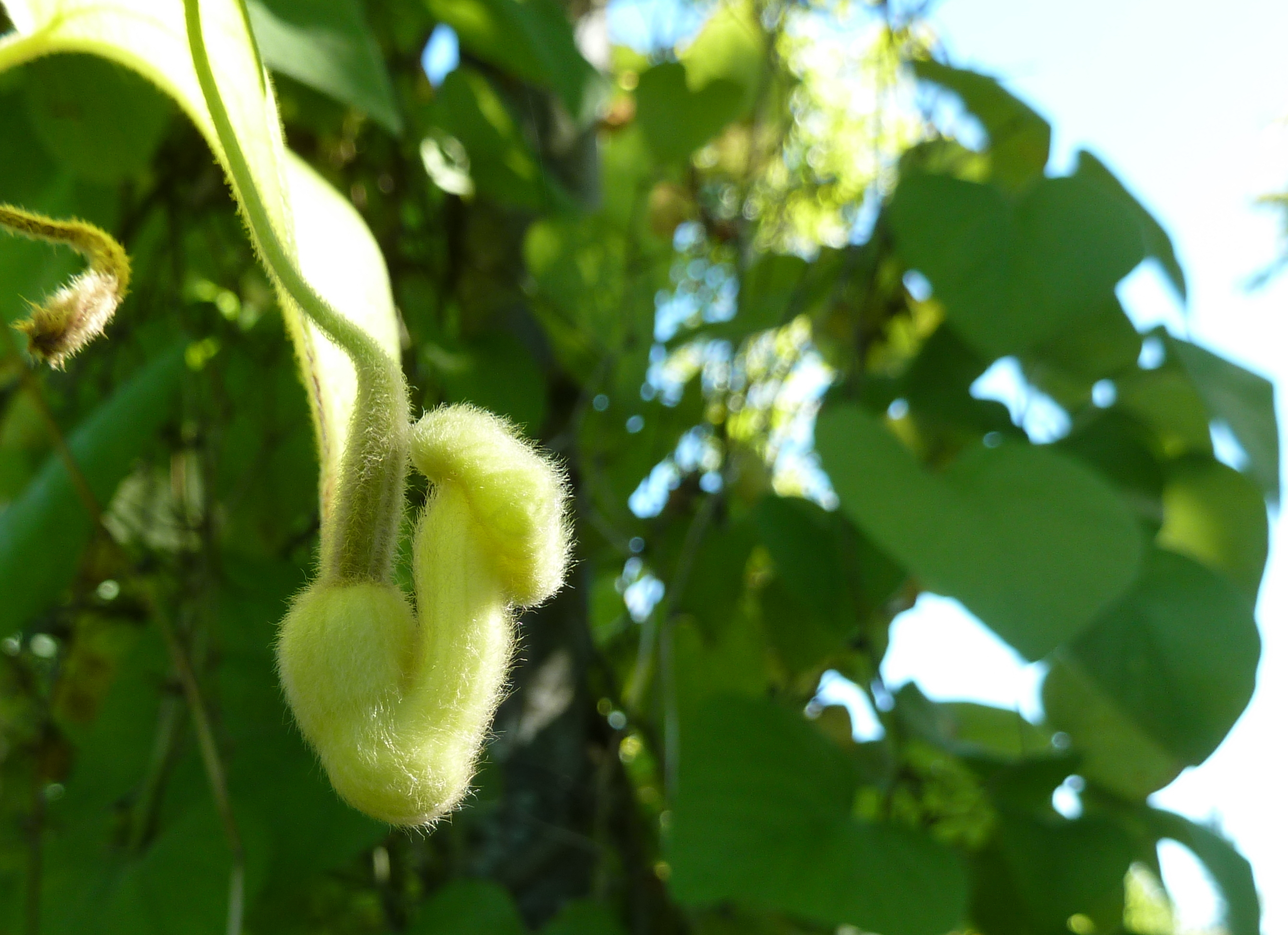 Aristolochia tomentosa, at UBC Botanical Garden